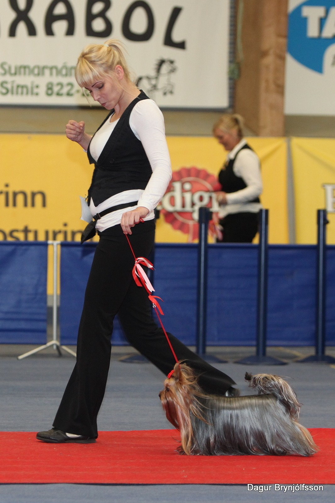 Hundasýning 2009 554